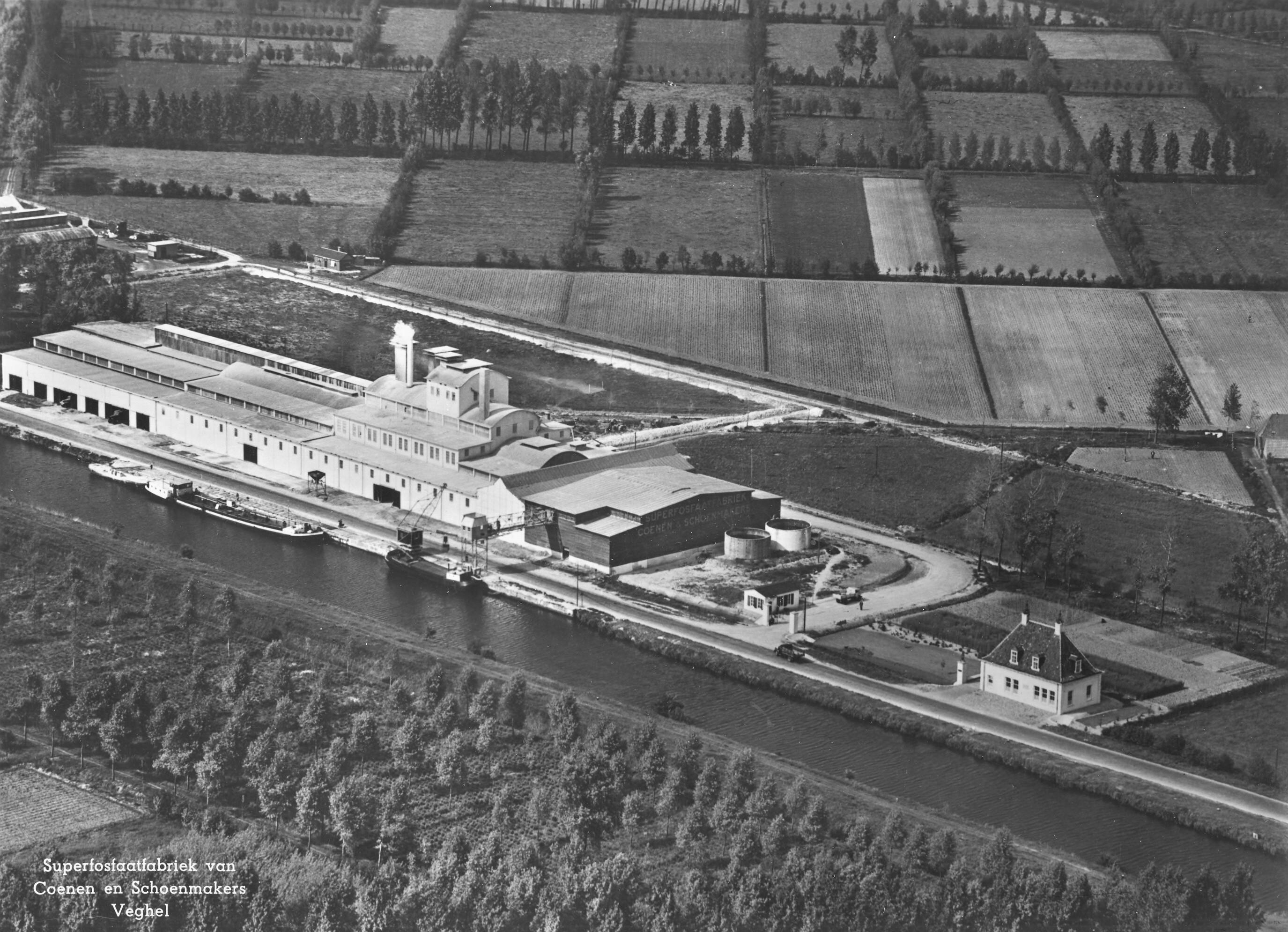 Fabrieksgebouwen aan de Zuid-Willemsvaart van de NV Chemische fabriek Coenen en Schoenmakers te Veghel.